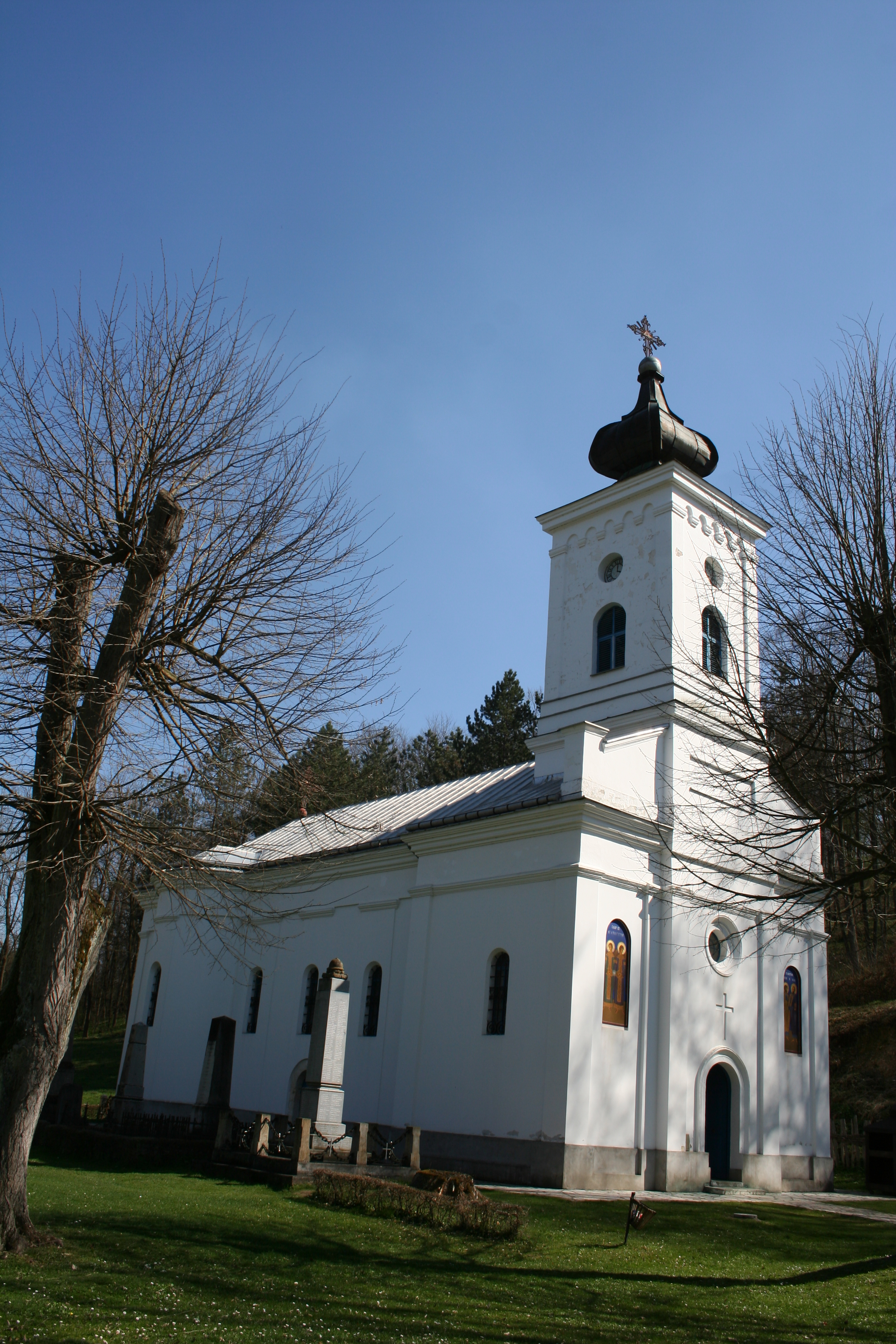 Crkva u Brankovini